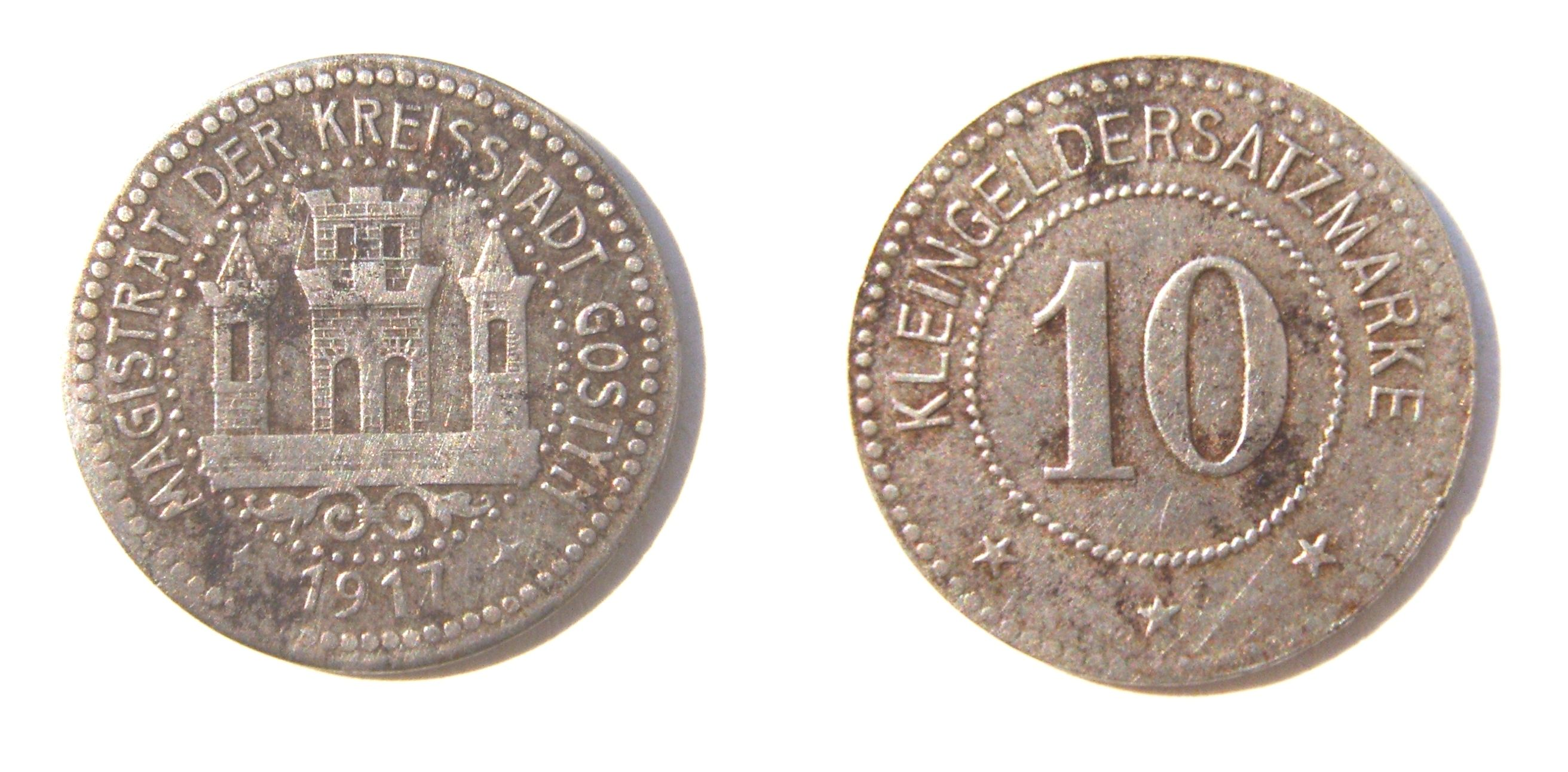 Moneta zastępcza - emisja Rady Miejskiej Gostynia. Rok 1917. Żelazo